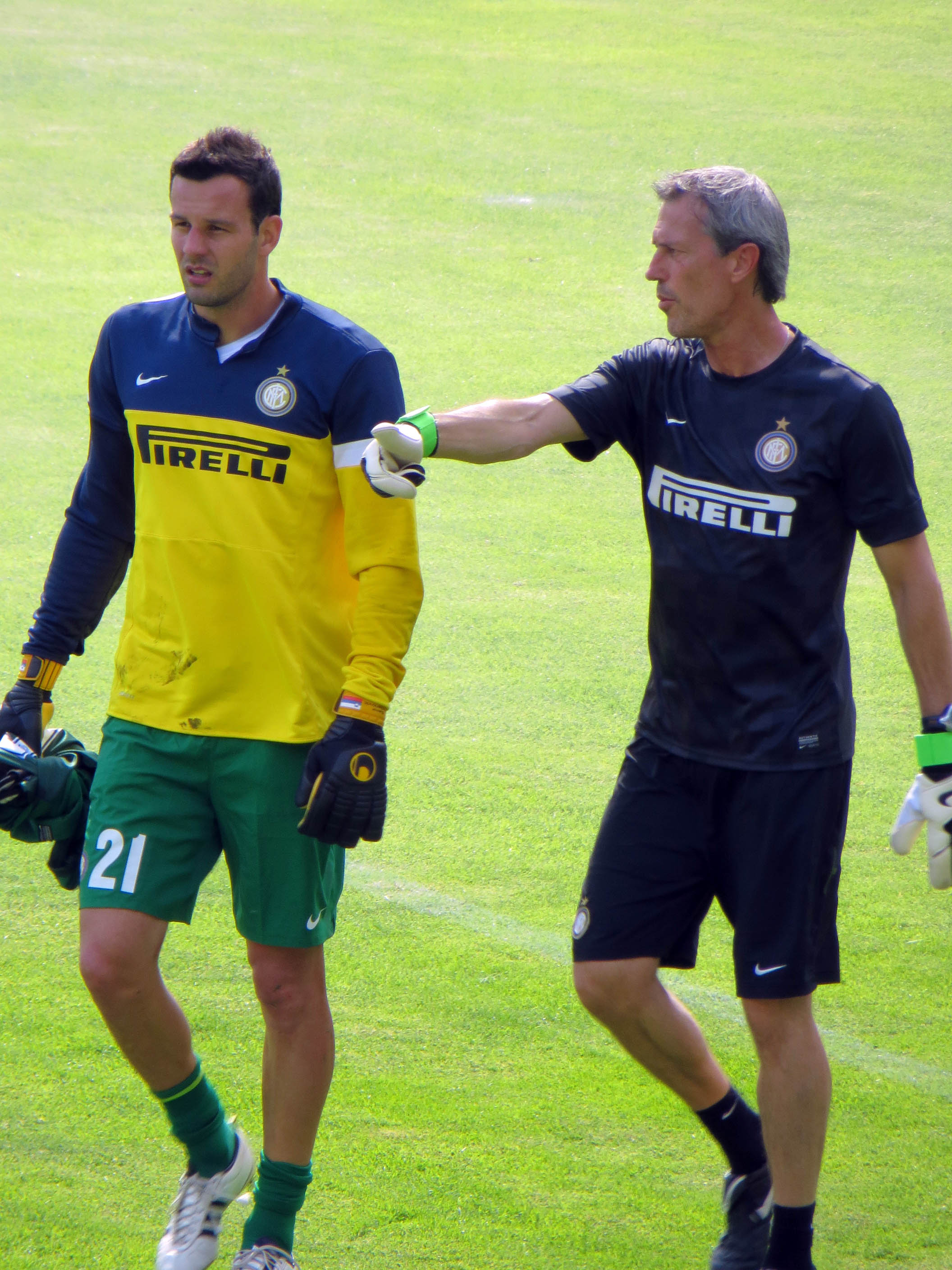 Samir Handanović and Alessandro Nista